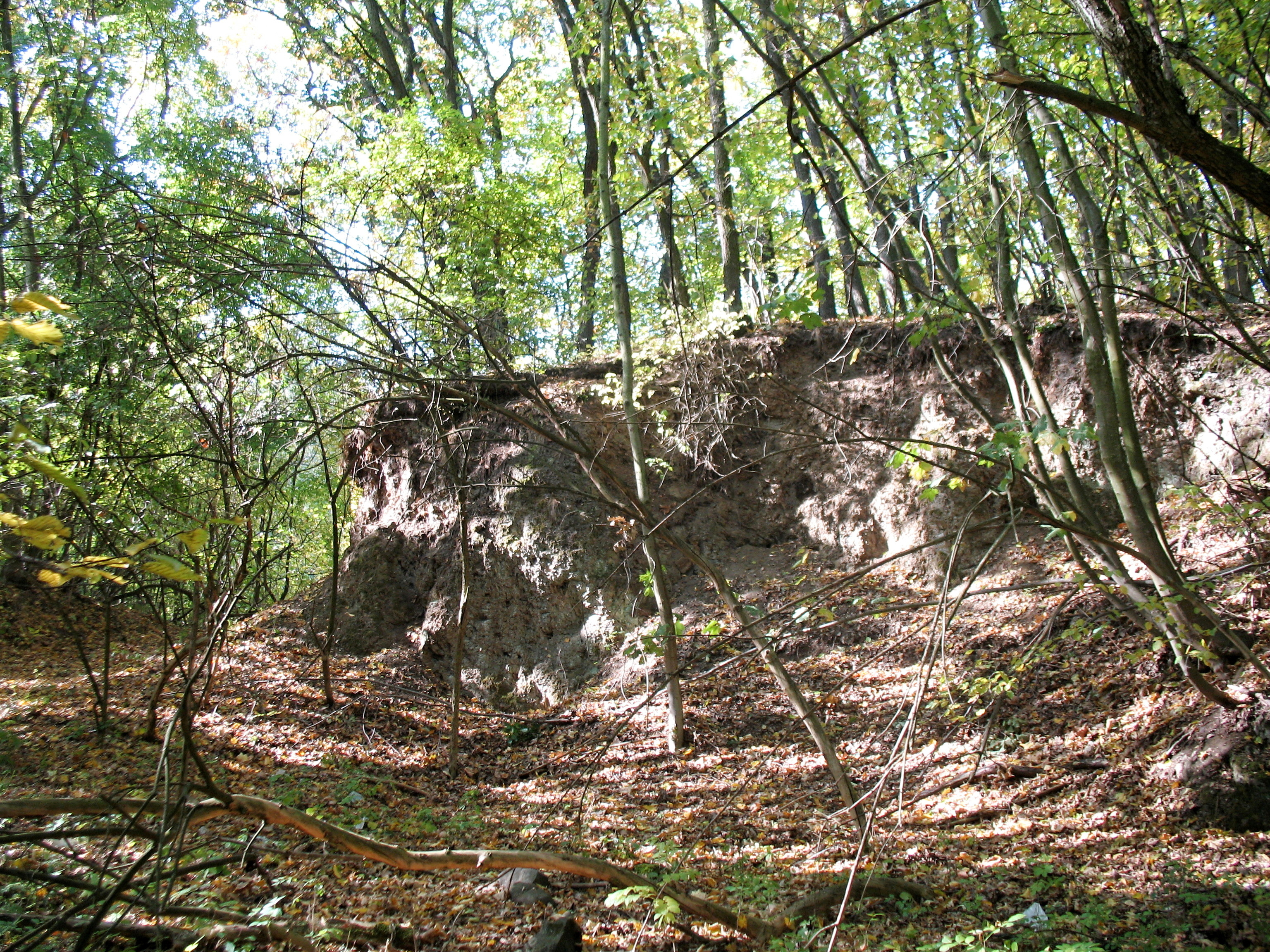 Malý lom s tzv. kamennými slunci na severním úpatí vrchu Linhorka, katastrální území Staré, okres Litoměřice